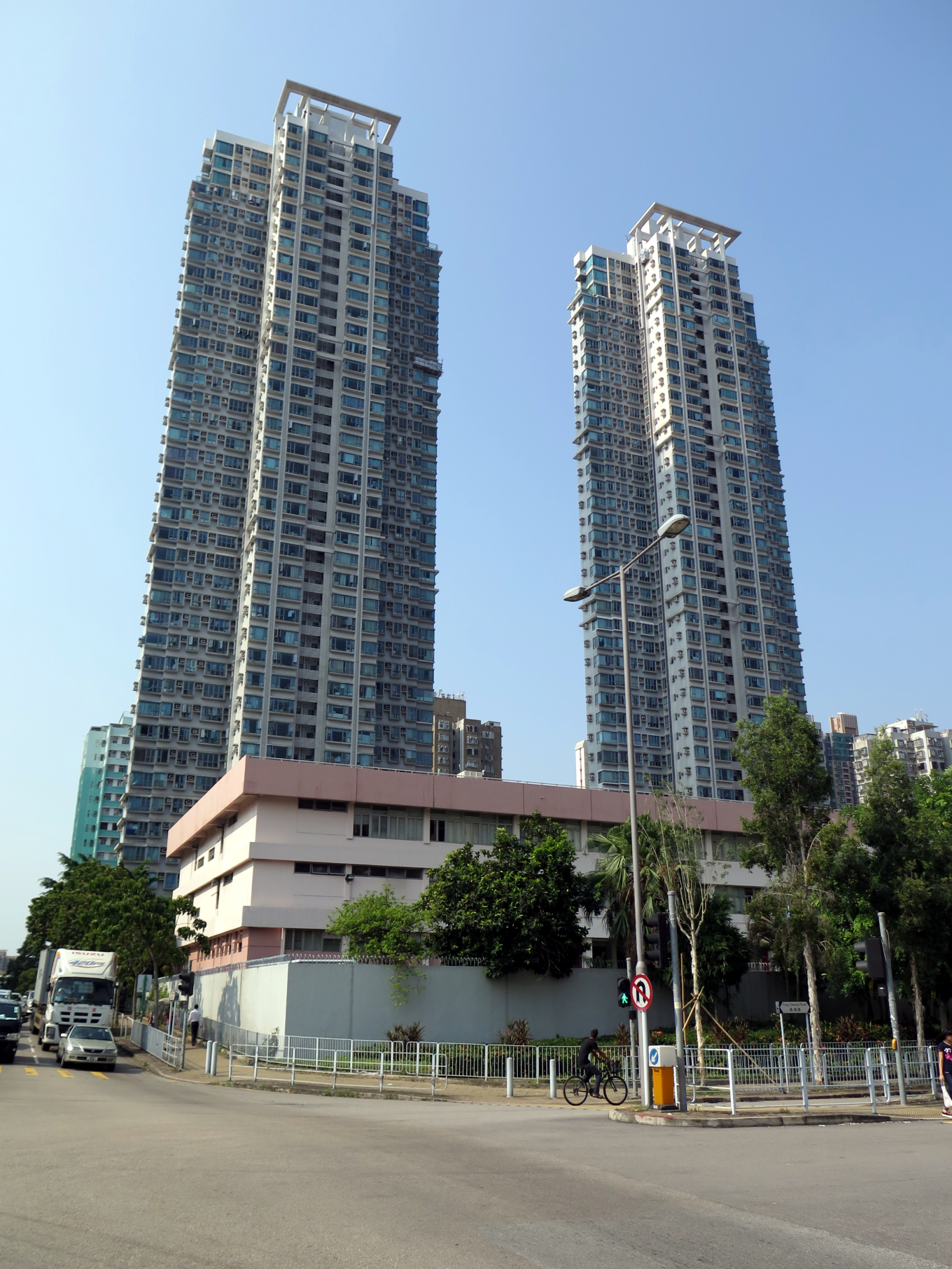 Greenfields 雍翠豪園